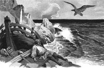 Věnceslav Černý: Staré pověsti české (pták Noh odnáší Bruncvíka)